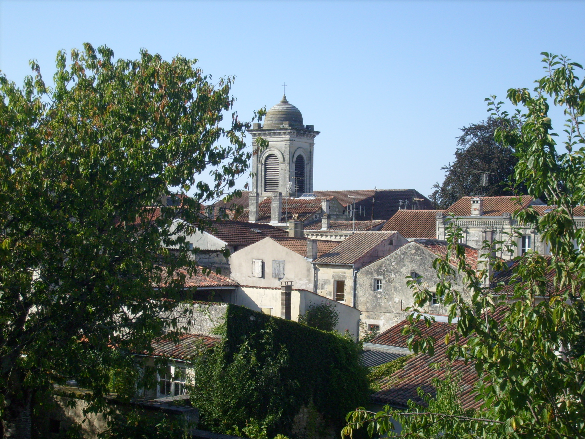 Centre-ville et clocher de l'église Saint-Martin, Pons